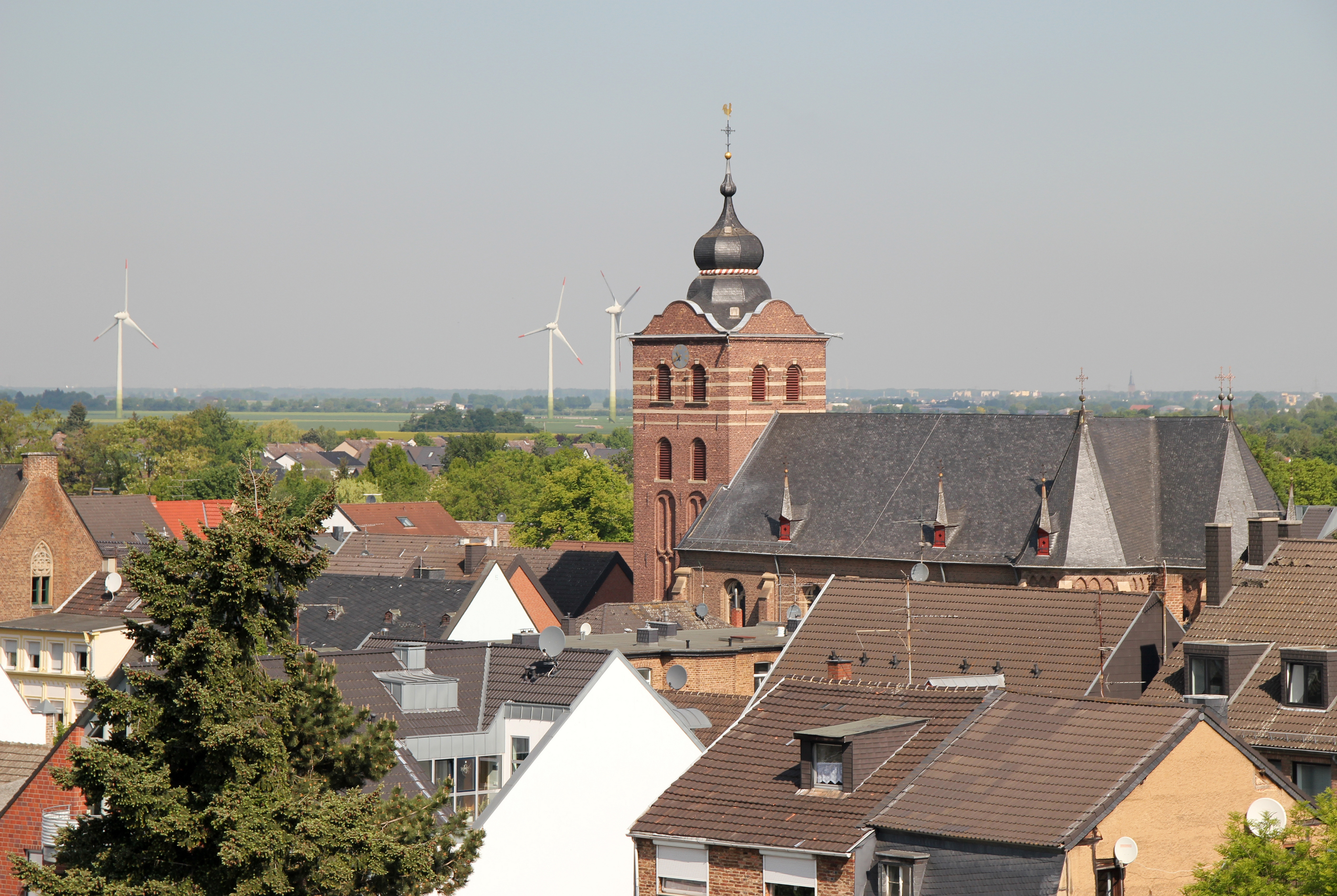 Lechenich mit Teilbereichen seines Umlandes